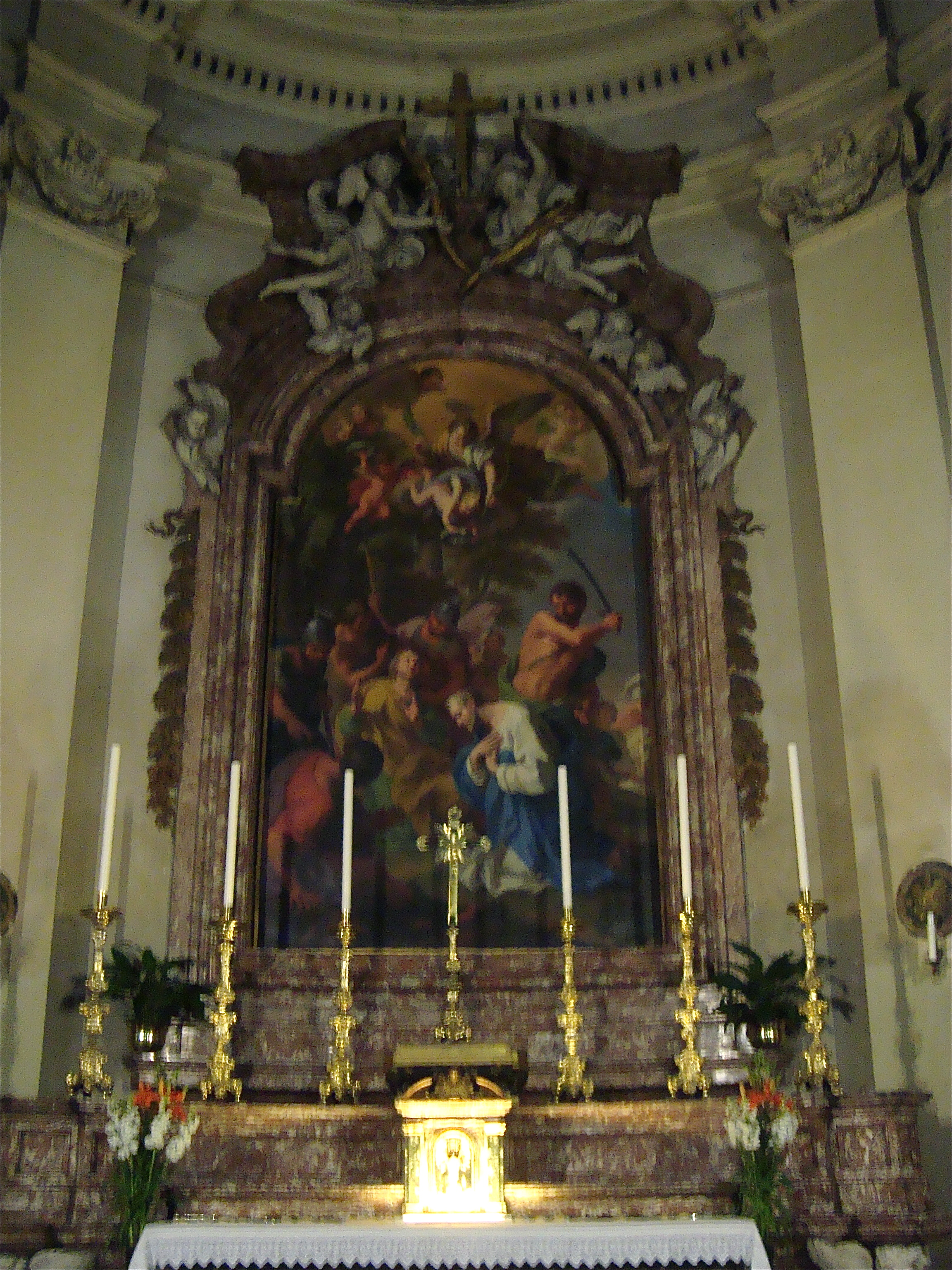 Maitre-autel de l'église Santi Marcellino e Pietro al Laterano de Rome représentant le martyre des saints Marcellin et Pierre par Gaetano Lapis